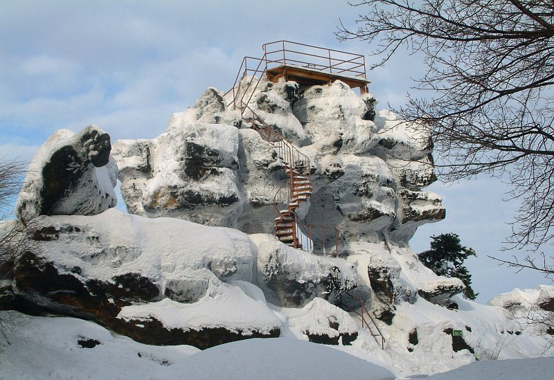 Felstor auf dem Töpfer, Zittauer Gebirge, Sachsen, Deutschland.